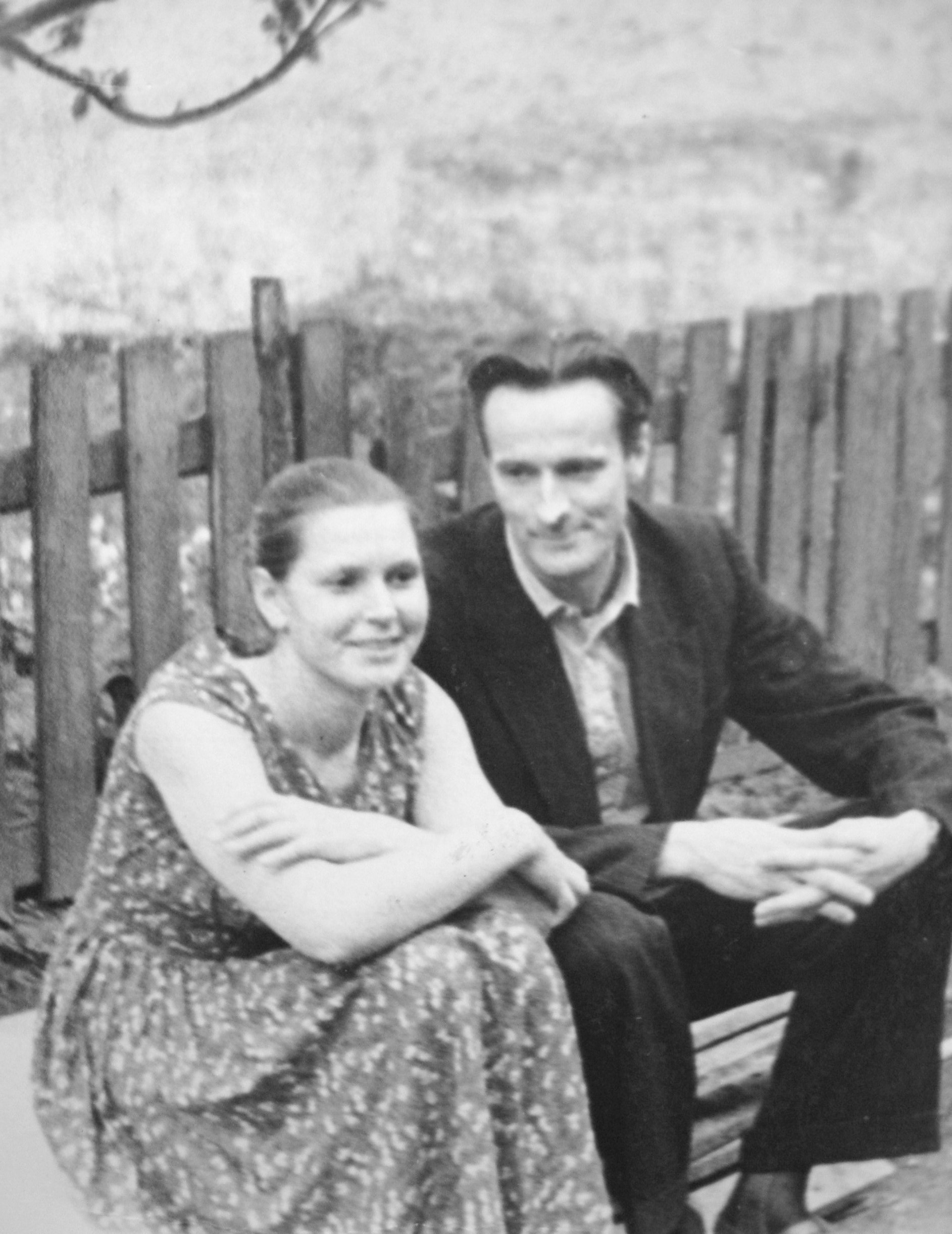 Ģimenes portrets. Keramiķe Marija Ozoliņa ar vīru Imantu Ozoliņu.